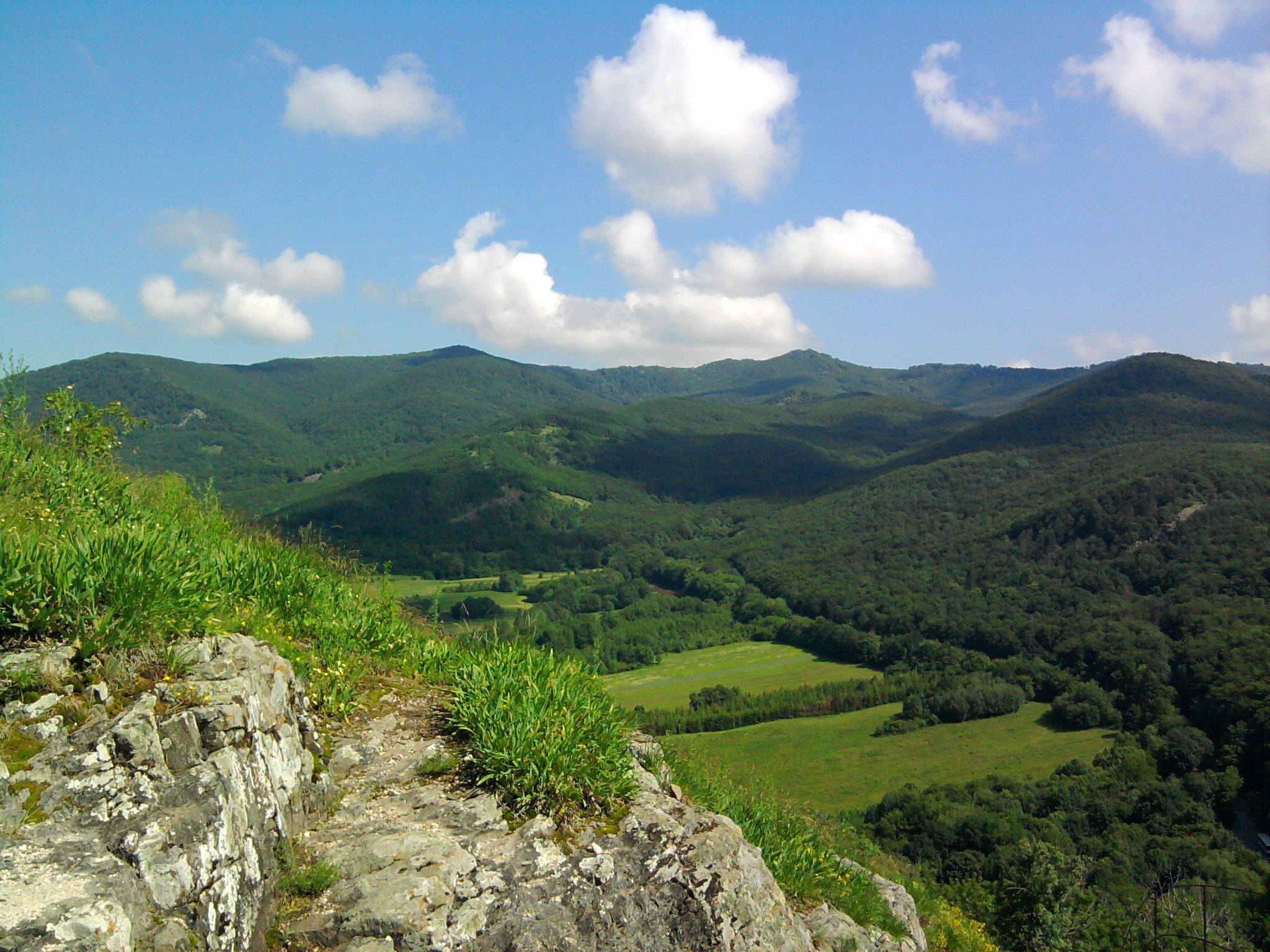 várrom This is a photo of a monument in Hungary, Identifier: 2767